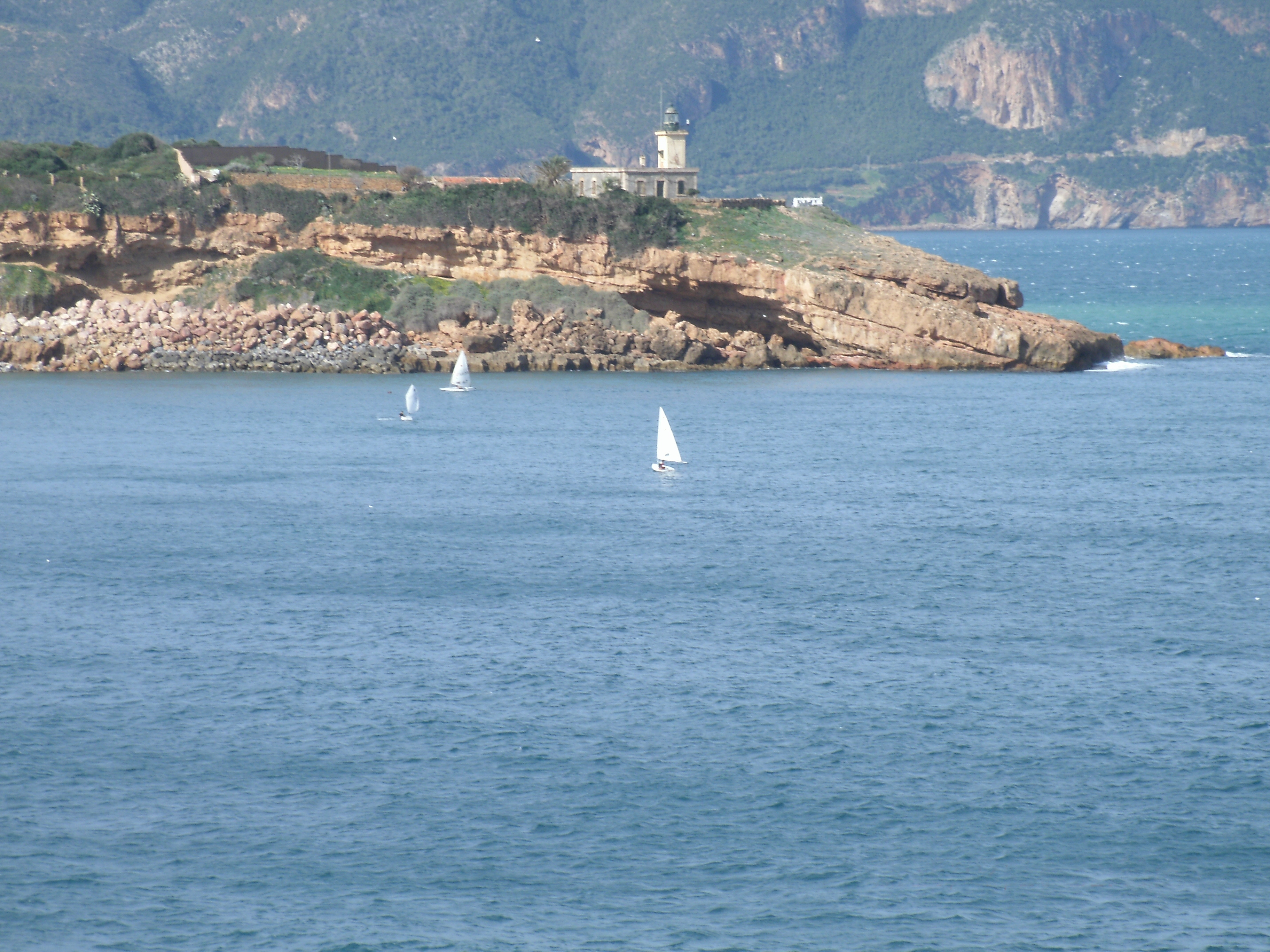 Phare de Tipaza.